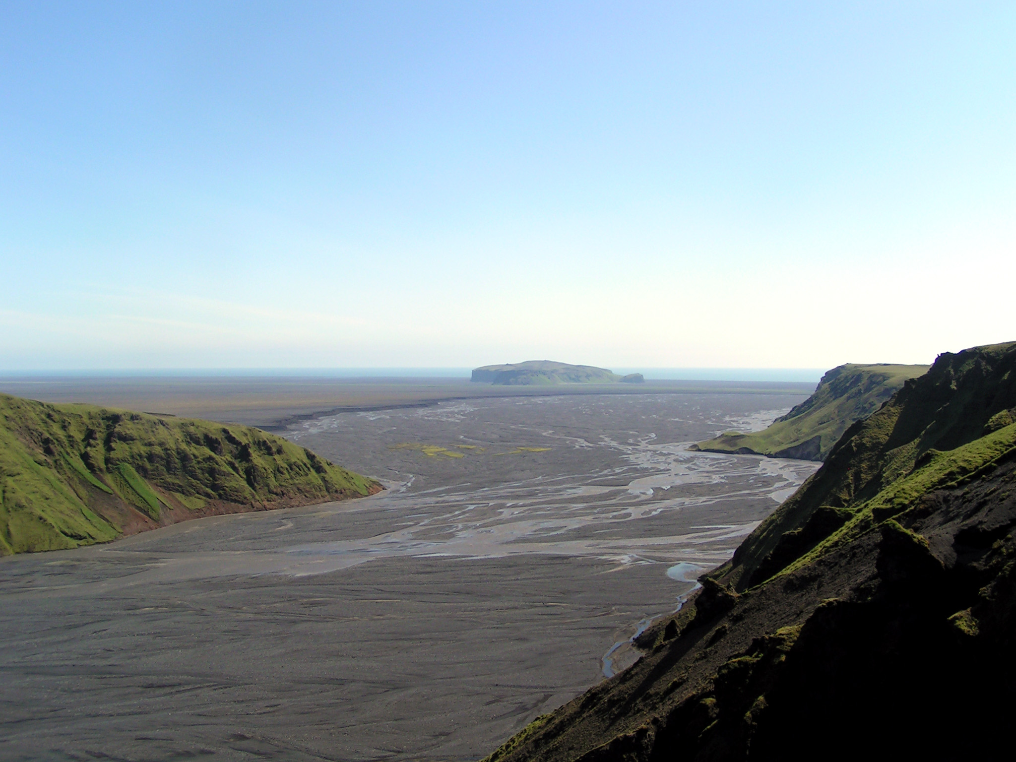 Landskap på Sydisland. Utsikt till berget Hjörleifshöfði och havet.